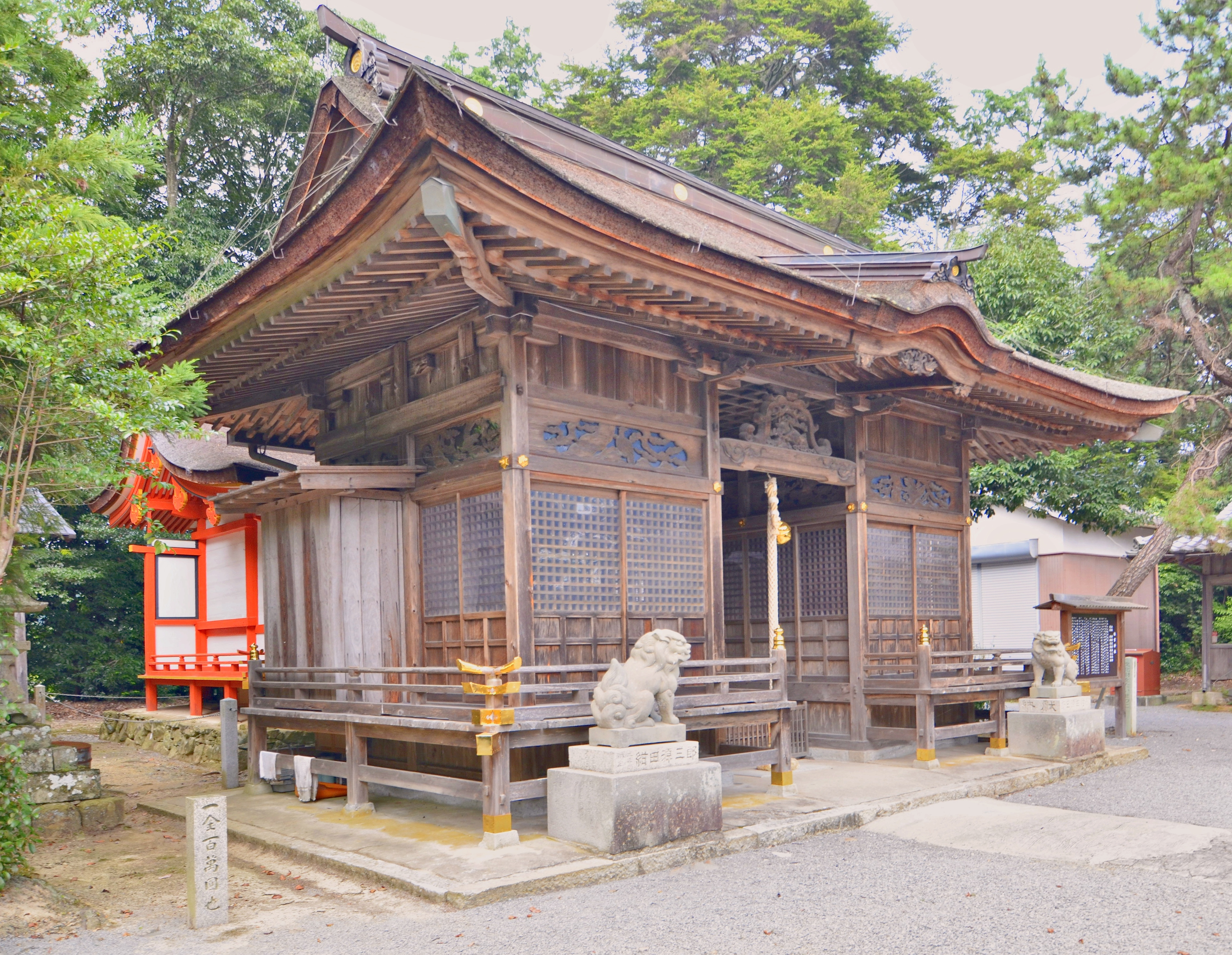 三田大川瀬住吉神社